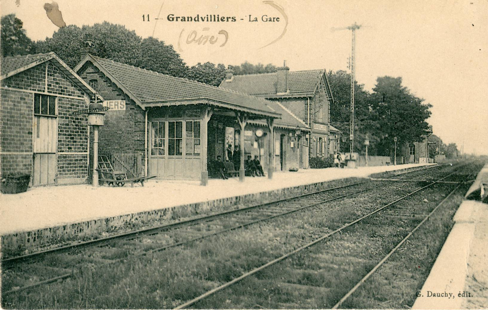 Carte postale ancienne éditée par Dauchy, N°11 Grandvilliers (Oise) : la Gare